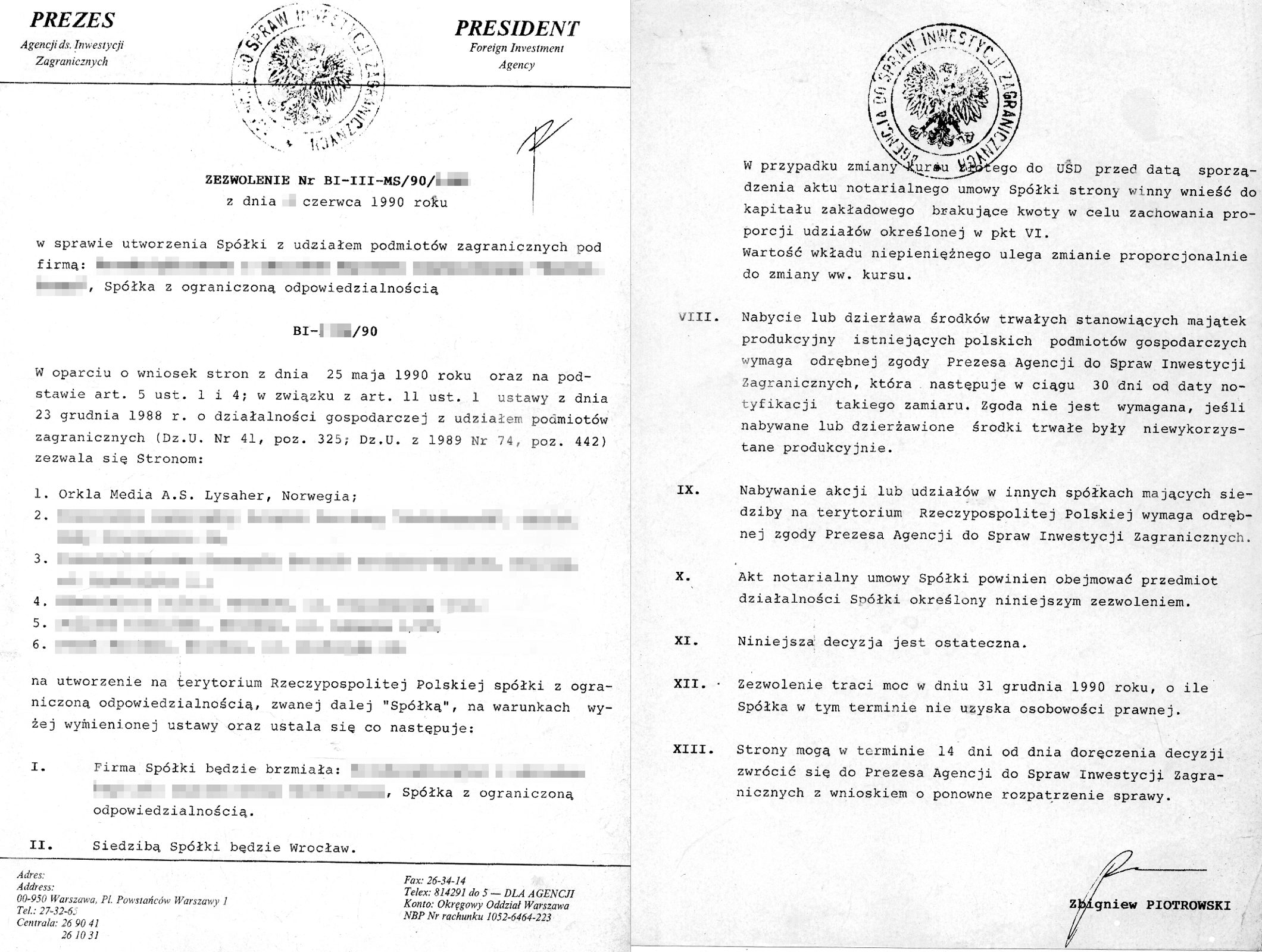 Pierwsza i ostatnia strona dokumentu z roku 1990, zezwalającego na utworzenie w Polsce spółki z udziałem kapitału zagranicznego (w tym przypadku z Norwegii).(Niektóre dokładne daty, nazwy i adresy oraz numery identyfikacyjne zniekształcone elektronicznie)